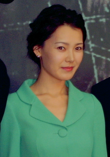 2004년 7월 7일 서울극장에서 열린 영화 《거미숲》 기자시사회에 참석한 배우 서정.